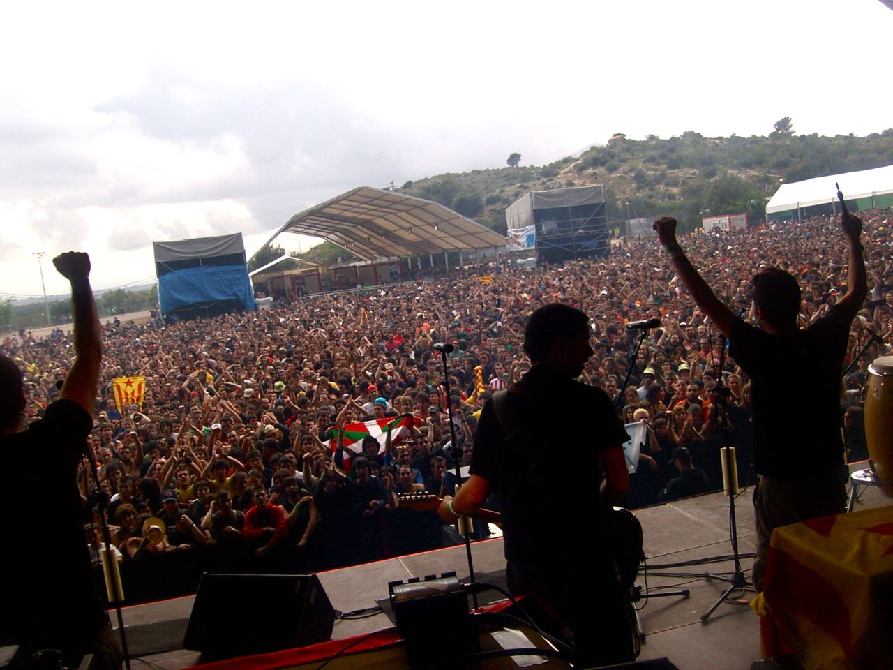 Obrint Pas al Viñarock celebrado excepcionalmente el 2007 en Benicassim (Castellón)